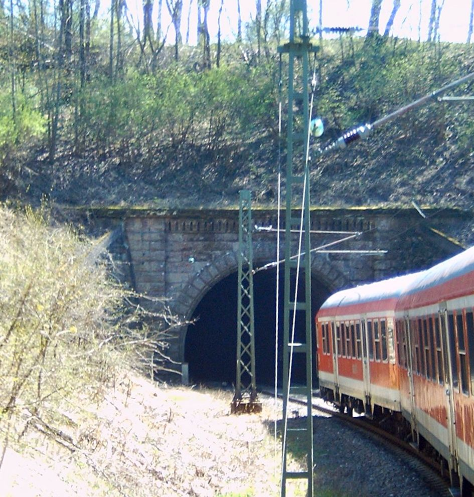 Ostportal des Bildwasentunnels der Riesbahn zwischen Lauchheim und Aufhausen